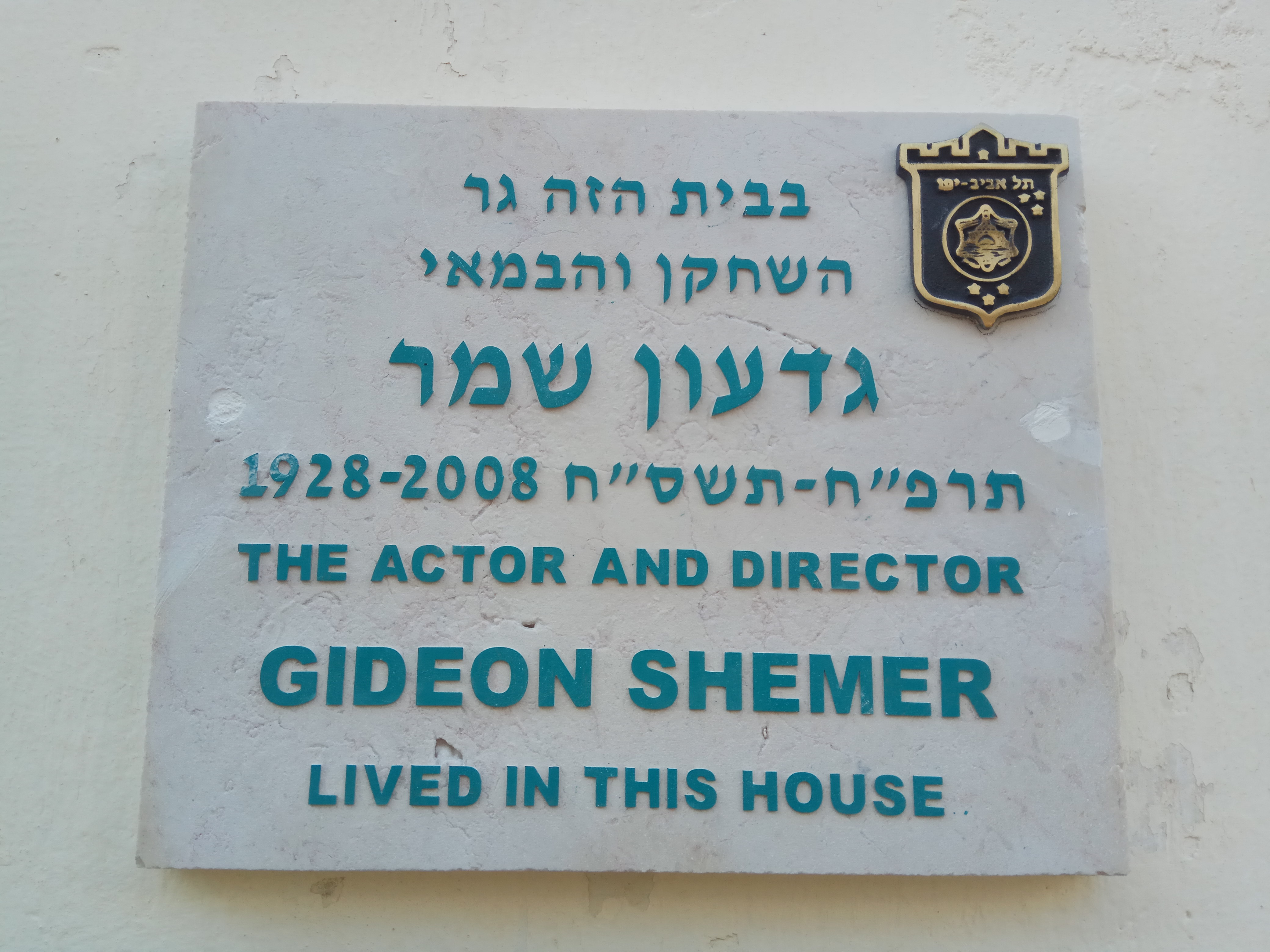 לוחית זיכרון לשחקן והבמאי גדעון שמר ברחוב כרמייה 8 בתל אביב